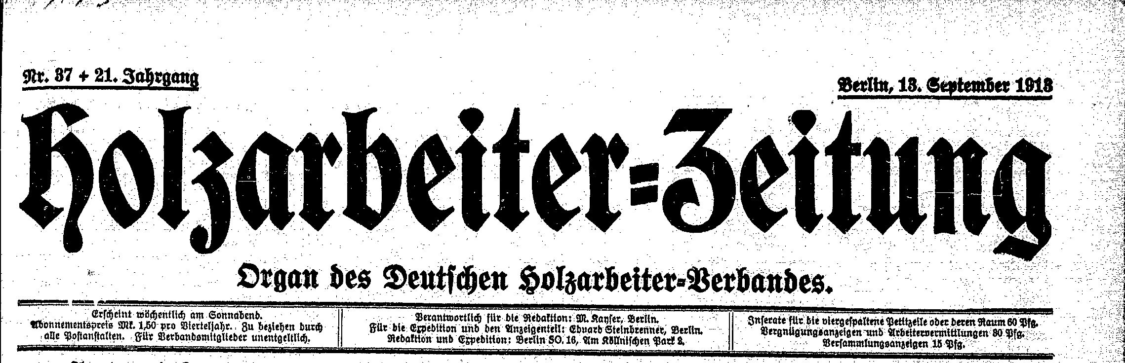 Der Deutsche Holzarbeiterverband, eine Gewerkschaft der holzver- und bearbeitenden Berufe, gab die Holzarbeiter-Zeitung als Organ des Verbandes heraus, die von 1893 bis 1933 wöchentlich erschien. Die Bibliothek der Friedrich-Ebert-Stiftung hat sie digitalisiert ins Netz gestellt.Link zum Digitalisat der Holzarbeiter-Zeitung [1] Hier der Titel der Ausgabe Nr. 37 vom 13. September 1913.